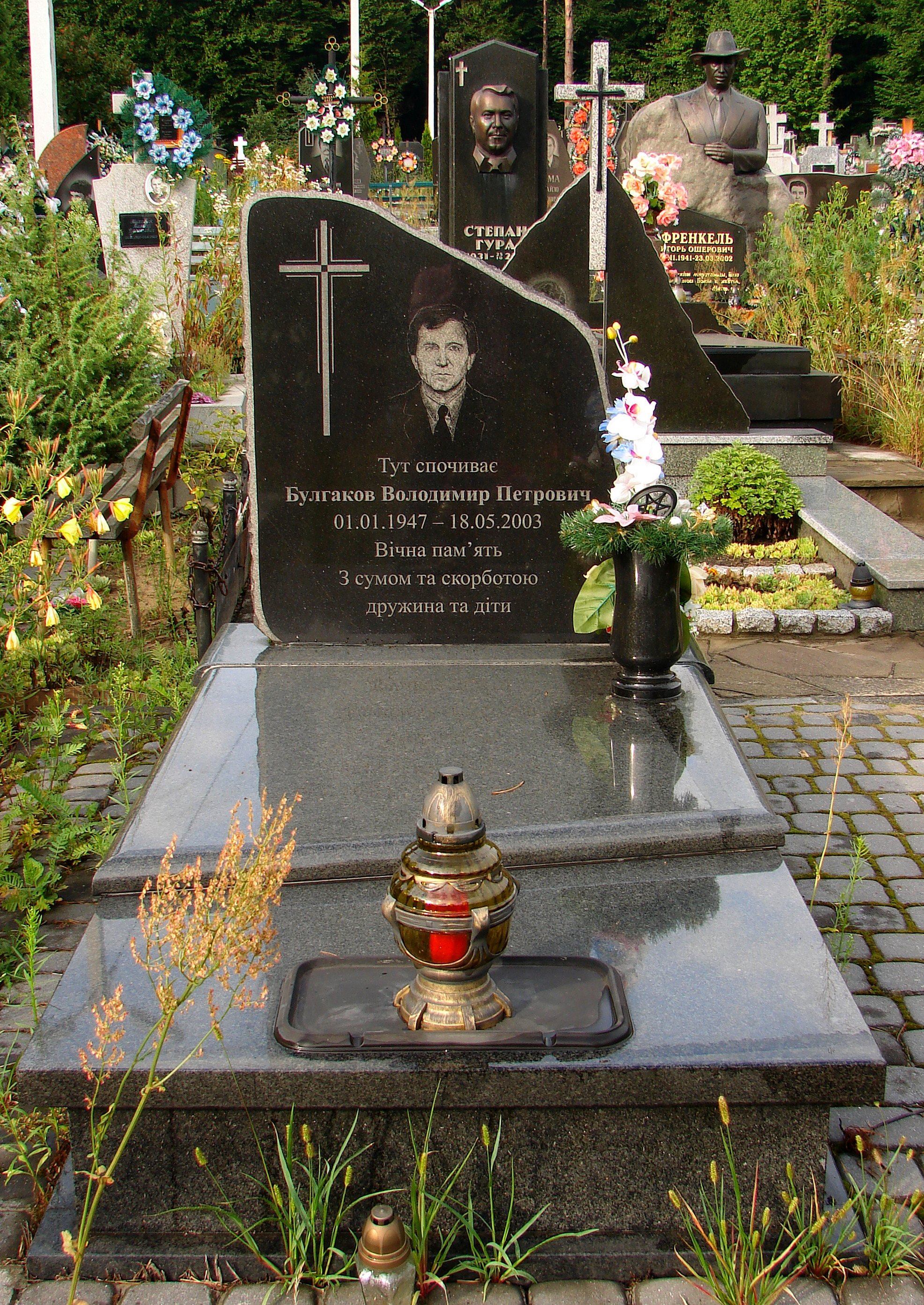 Брюховицький цвинтар. Могила Володимира Булгакова.